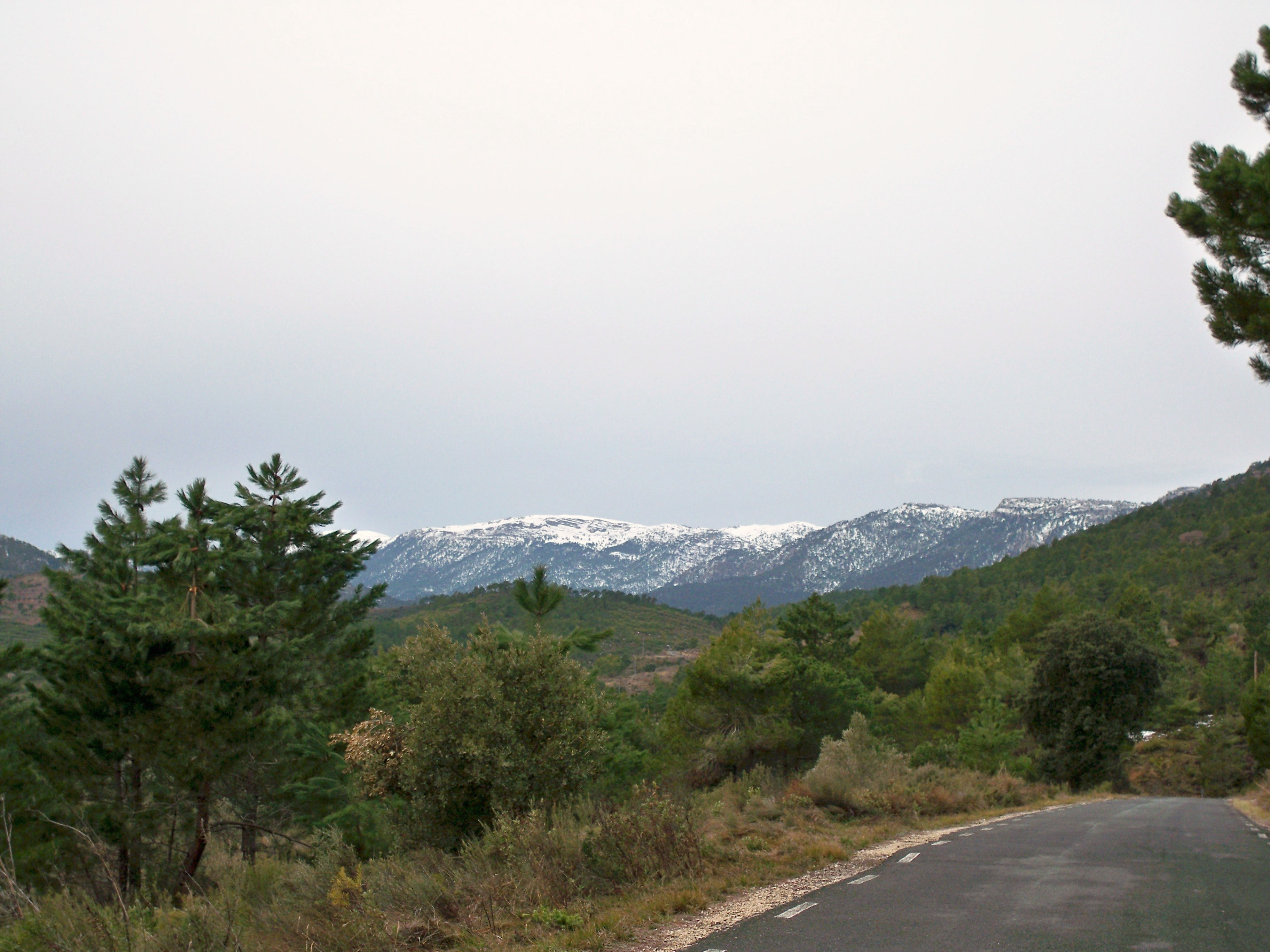 Vista de la Sierra del Cujón desde la carretera de Los Collados (Molinicos - Albacete).